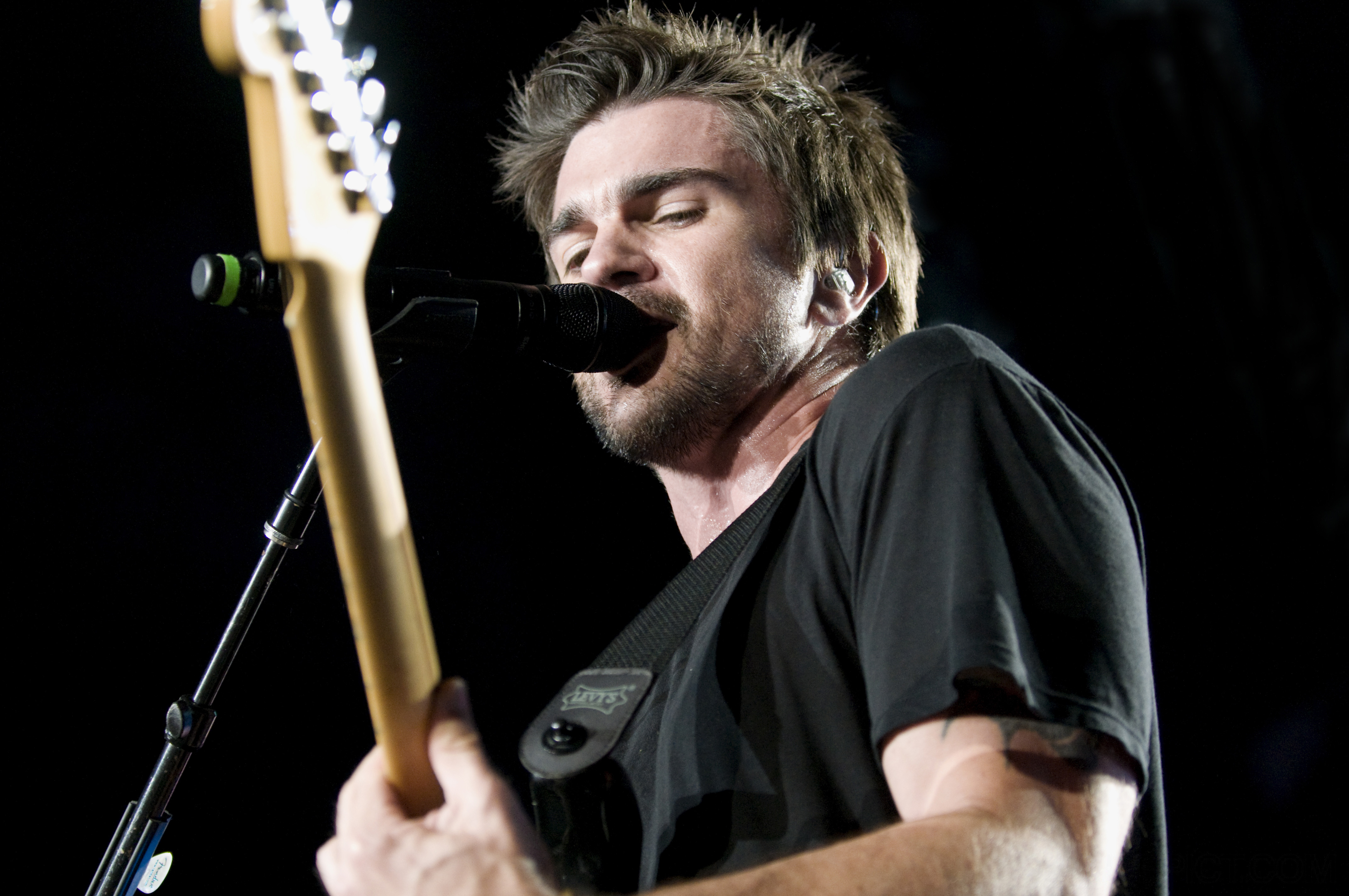 Juanes